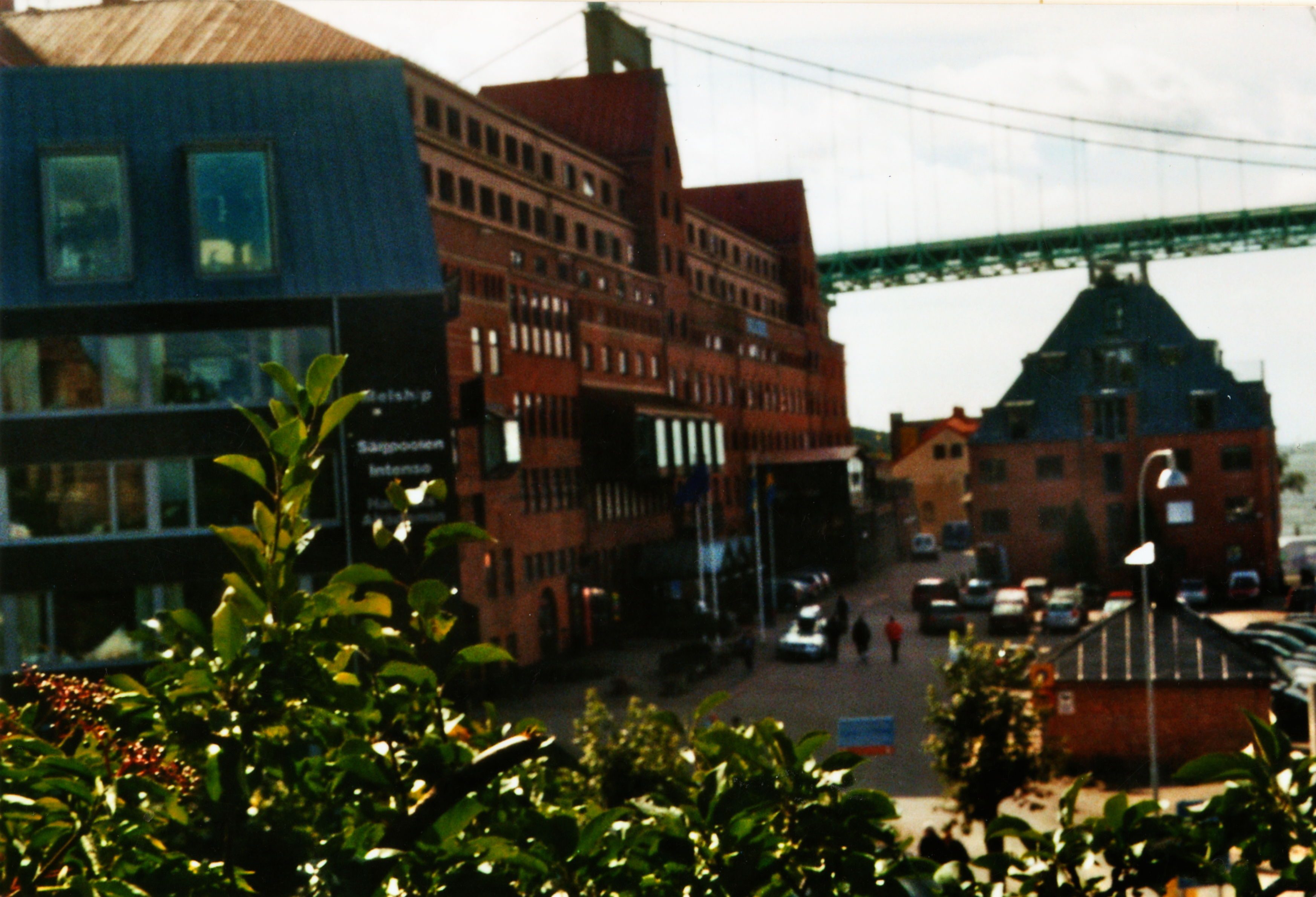 Novotel, Klippan (ca 1998).